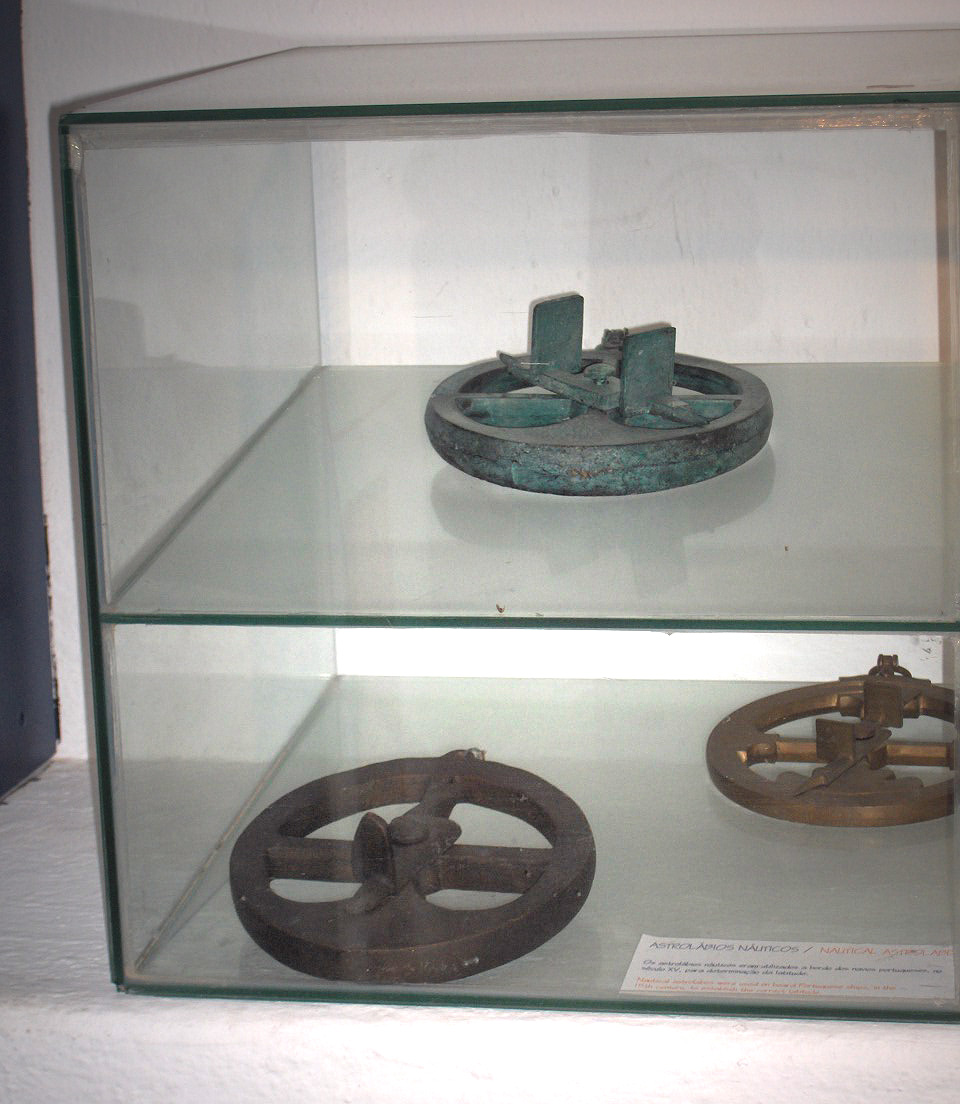 Astrolabes; Museum of the Forte da Ponta da Bandeira; Lagos, Portugal